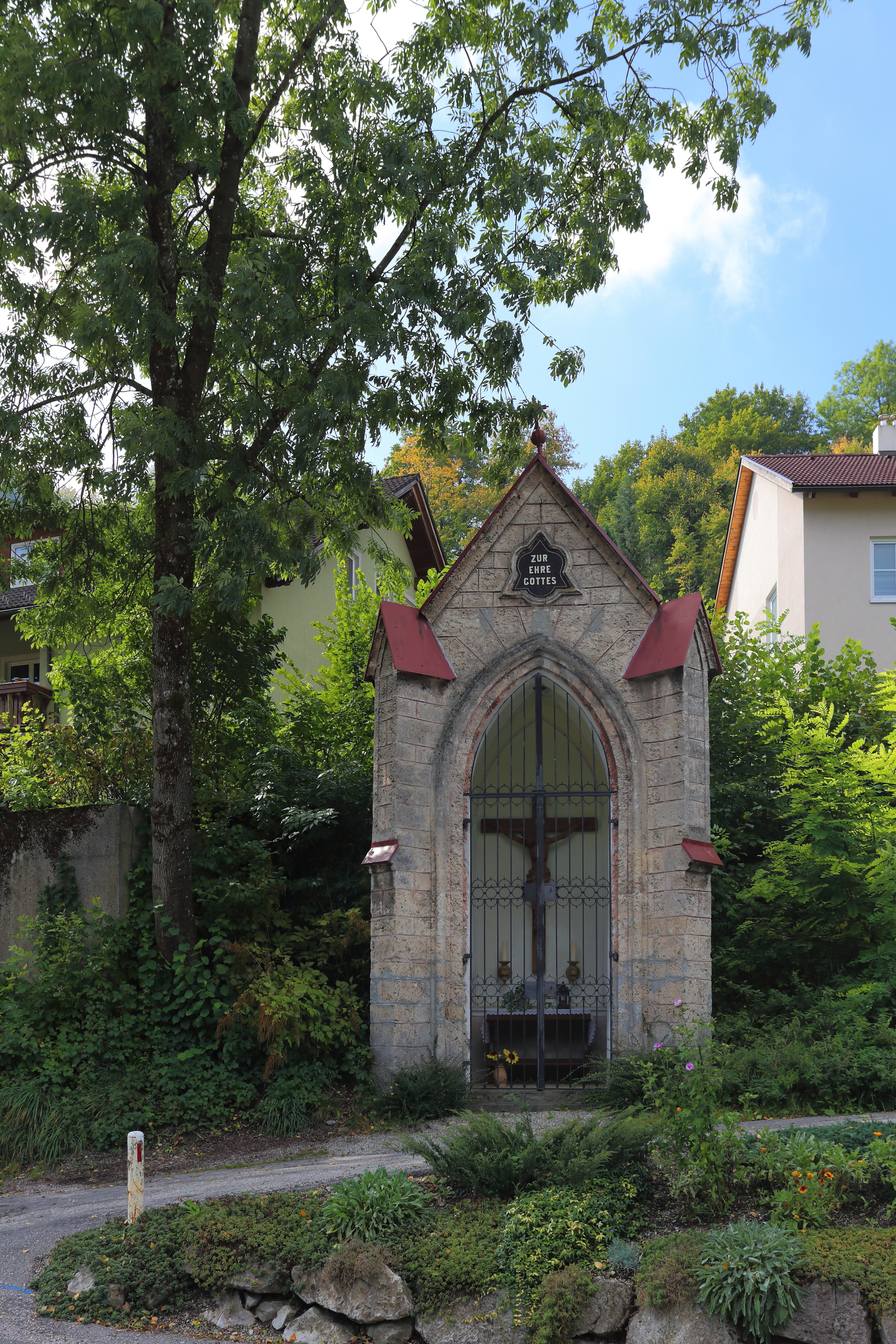 Die Wertheimkapelle in Neustift, ein Ortsteil der niederösterreichischen Bezirkshauptstadt Scheibbs. Ein 1863 errichteter neugotischer Konglomeratquaderbau mit Schmiedeeisengitter und spitzbogigem Kreuzgratgewölbe.